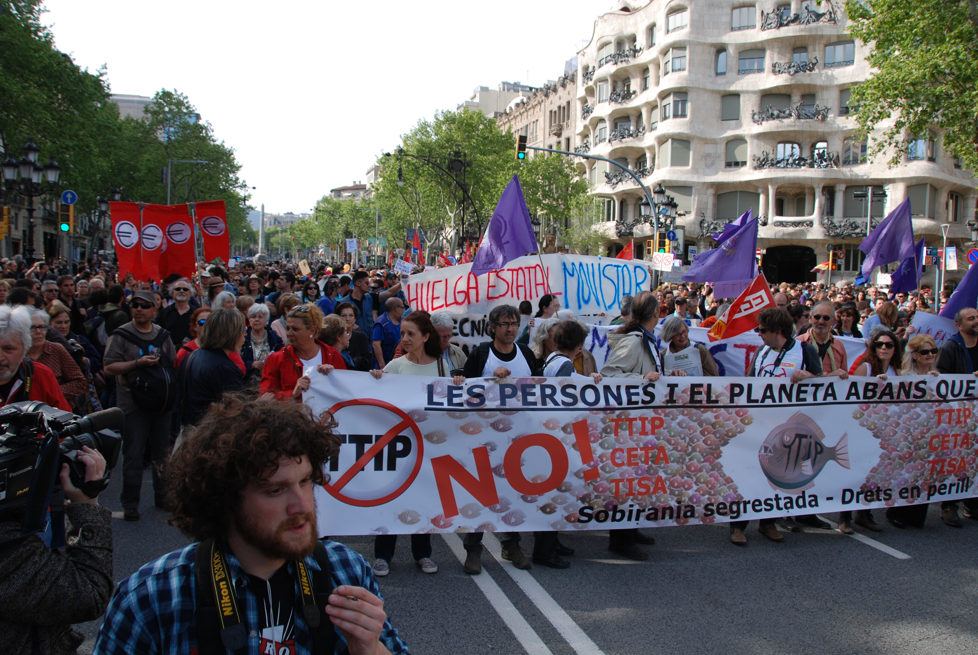 Cabecera de la mani